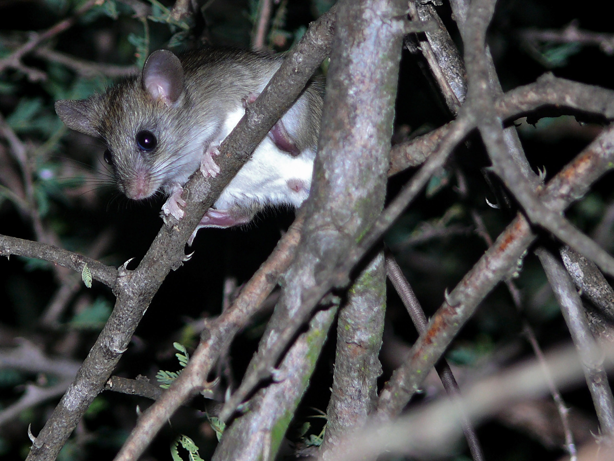 Letaba Night Drive, Kruger NP, SOUTH AFRICA